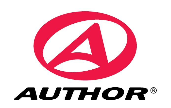 Логотип компании «Author»